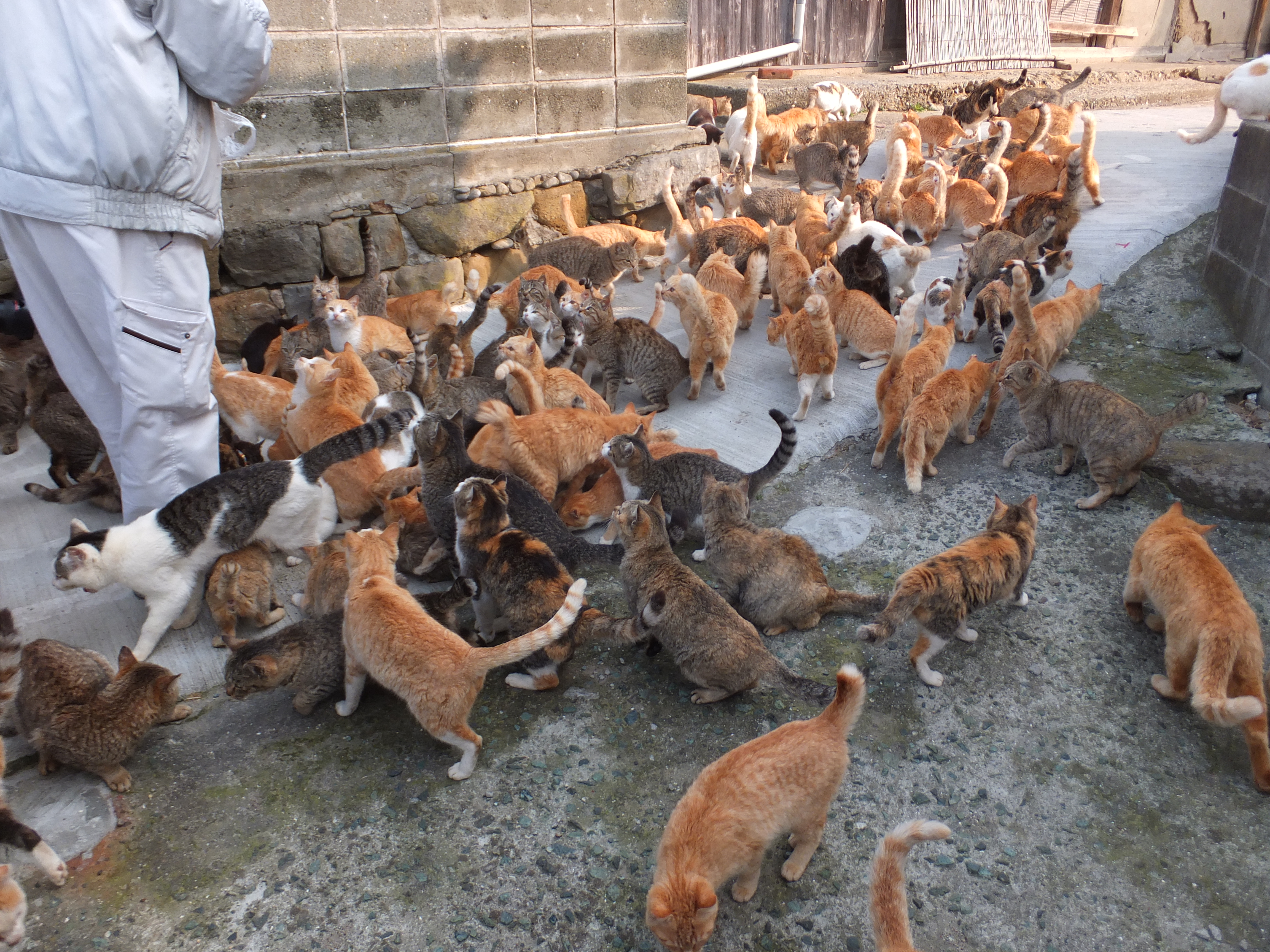 愛媛県青島で、地元の島民が与えるエサをもらっているネコたち。